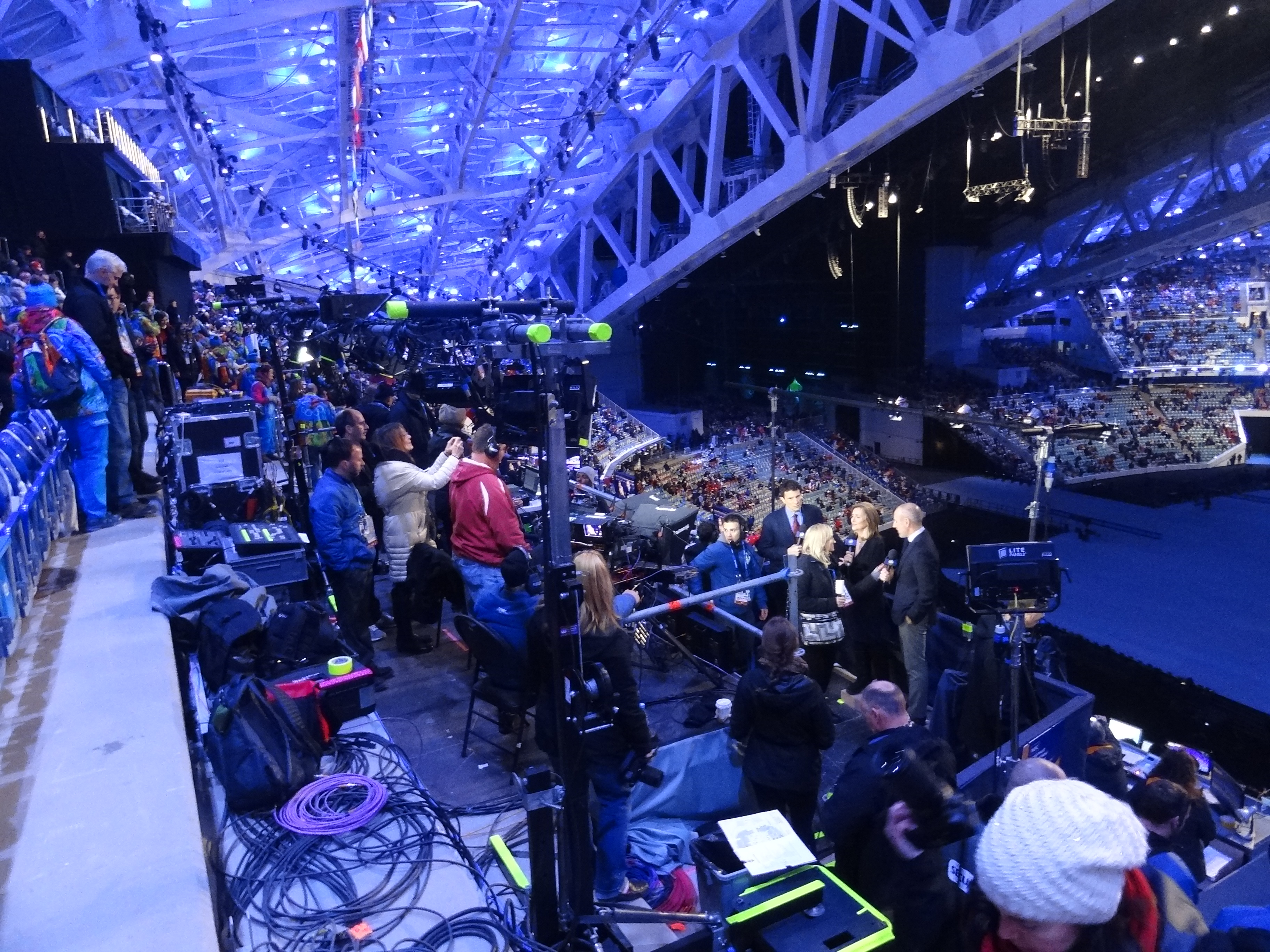 На Церемонии открытия XXII зимних Олимпийских игр в Сочи. 7 февраля 2014 года.